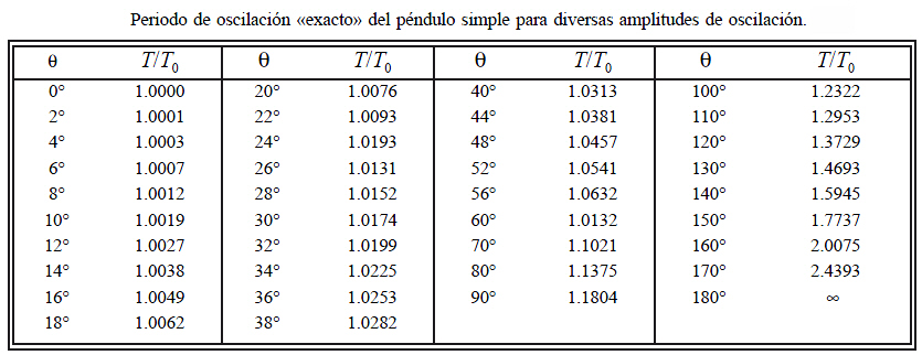 Pendulo Simple - Tabla exacta